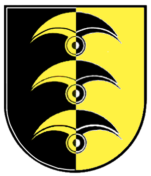 Wappen von Daugendorf in der Stadt Riedlingen, Baden-Württemberg